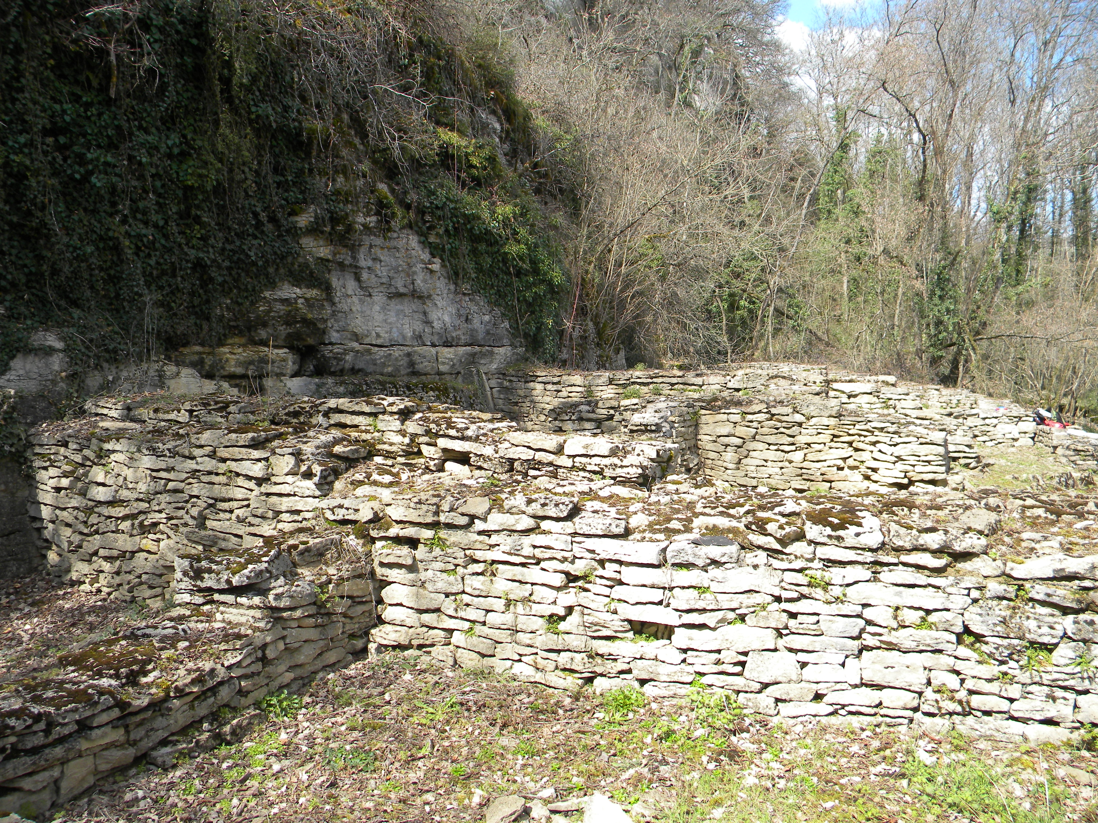 Dracy